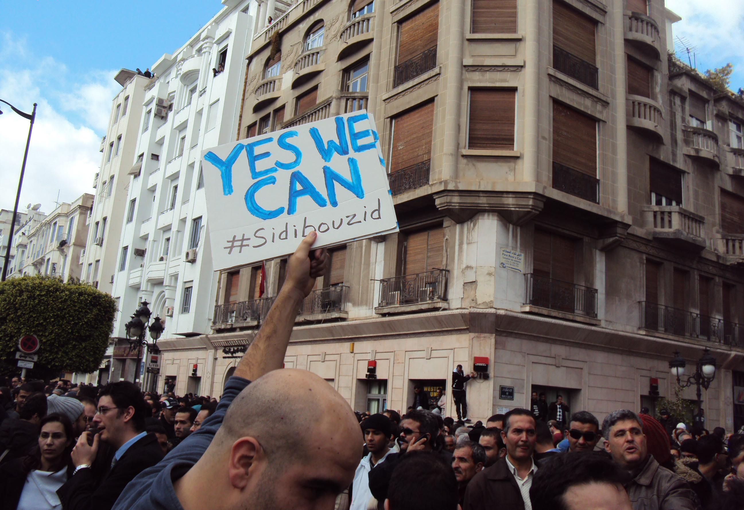 Photo prise lors de la manifestation du 14 janvier 2011 devant le ministère de l'intérieur à Tunis